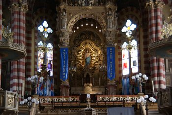 Altar de la Basílica de San Carlos Borromeo y María Auxiliadora, conocida como iglesia de María Auxiliadora, en Buenos Aires, Argentina. Se aprecia la influencia del clasicismo y del barroco en el arte cristiano contemporáneo desarrollado en América del Sur.